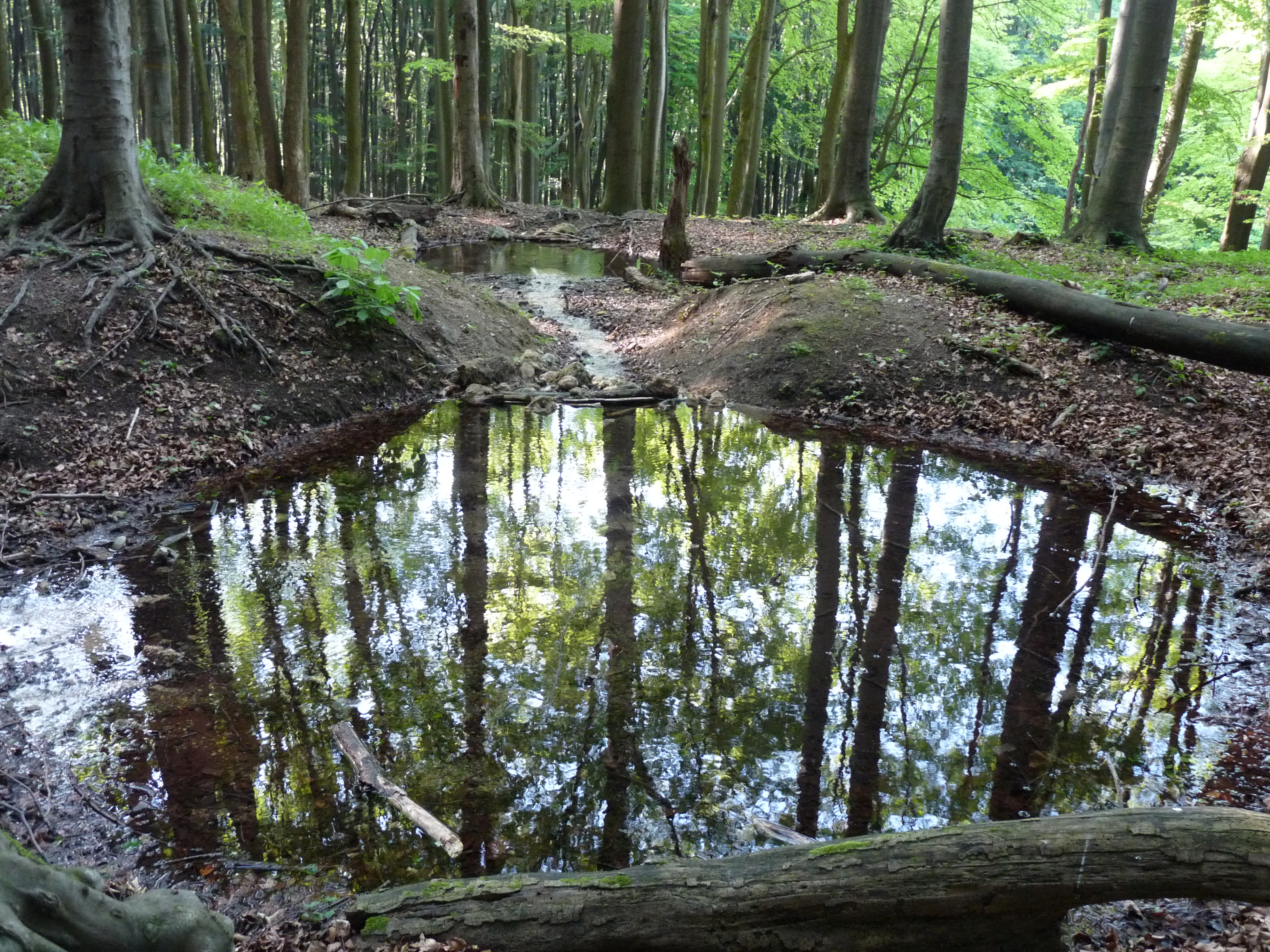 Travertínové jazierka